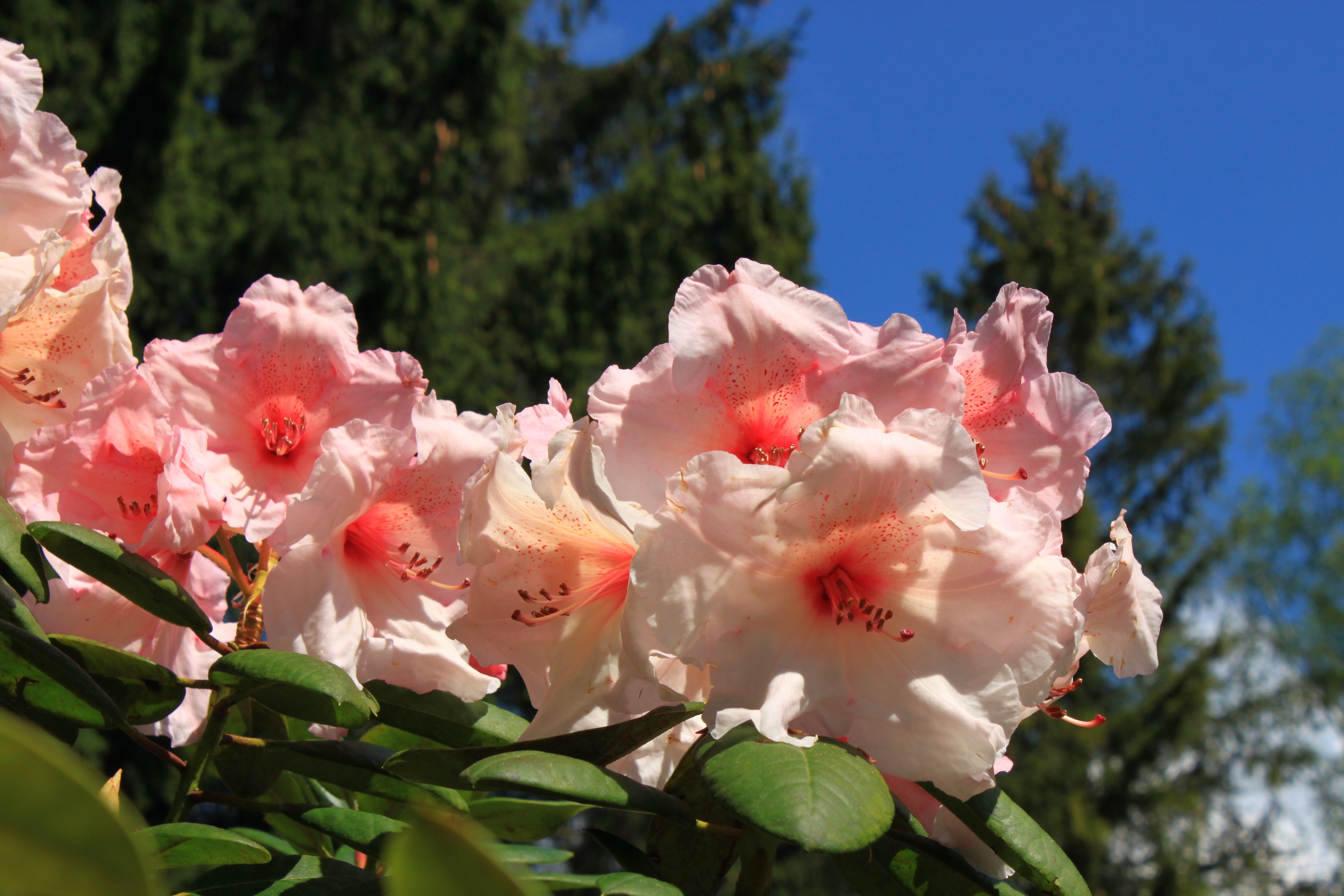 Im Seleger Moor. Das Seleger Moor mit seiner Rhododendron- und Azaleeenschau liegt zwischen Rifferswil und Hausen am Albis im Schweizer Kanton Zürich.